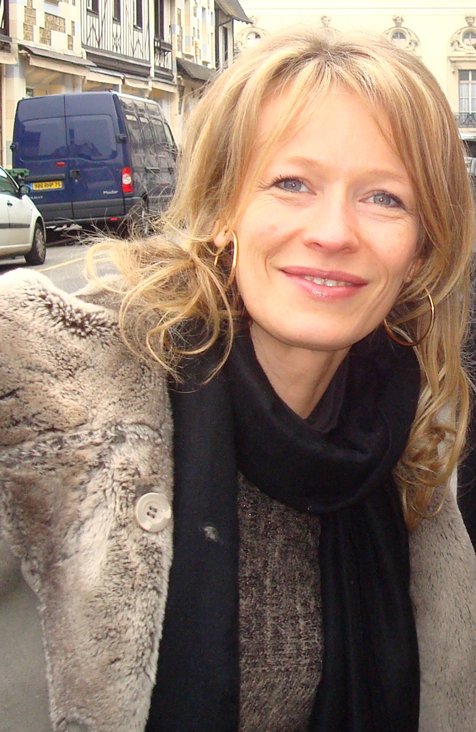 L'actrice française Sophie Broustal à Deauville en 2010.